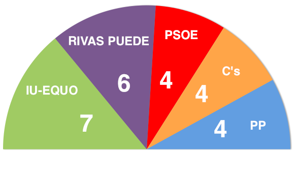 Ayuntamiento Rivas-Vaciamadrid 15-19